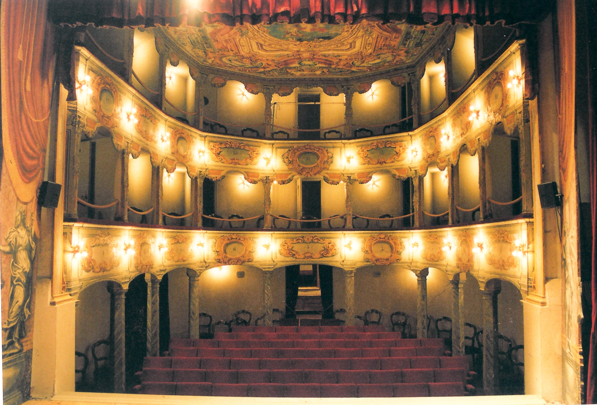 Vista dell'interno del Teatro Comunale di Penna San Giovanni